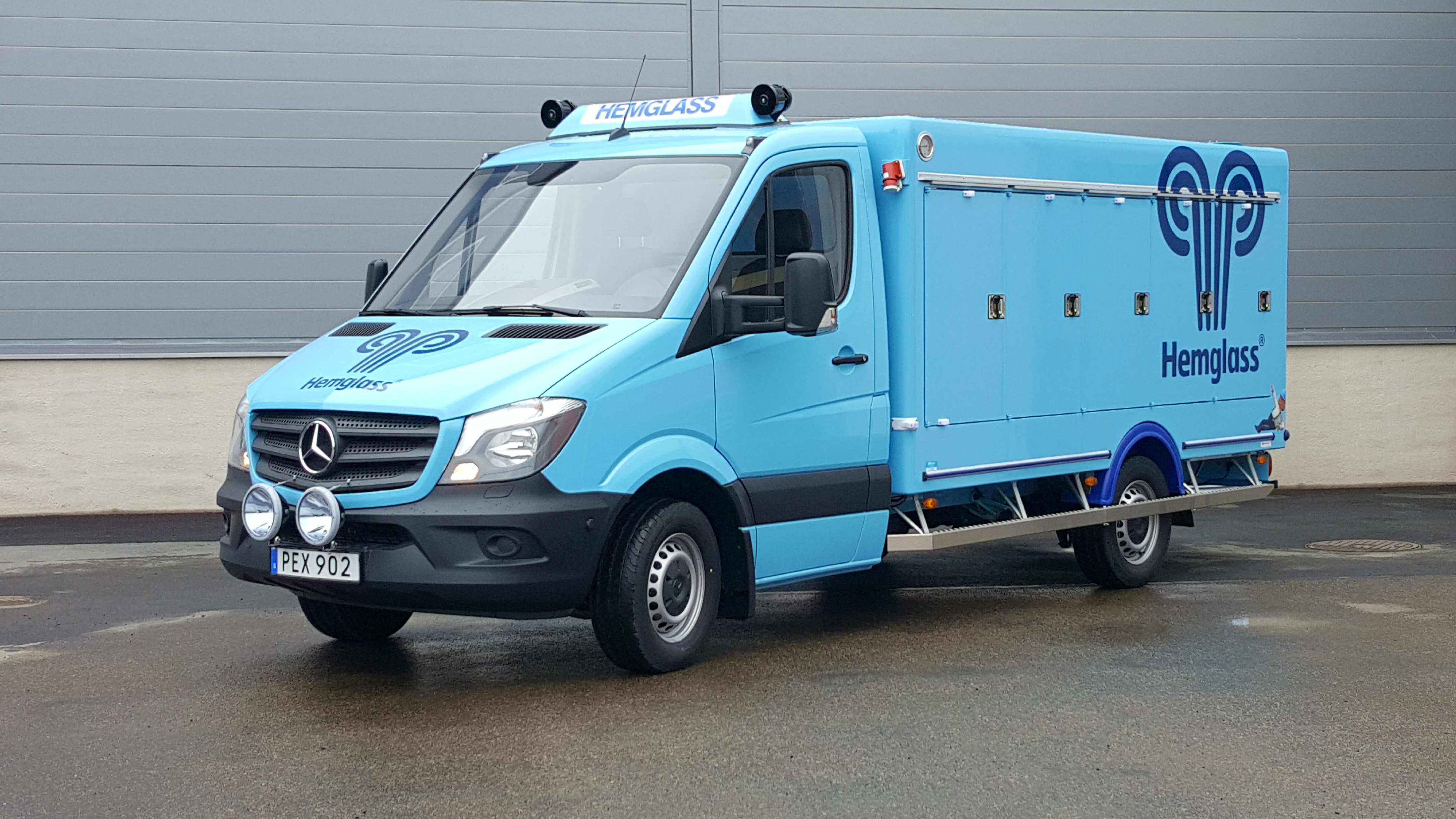 Hemglassbil från mars 2017